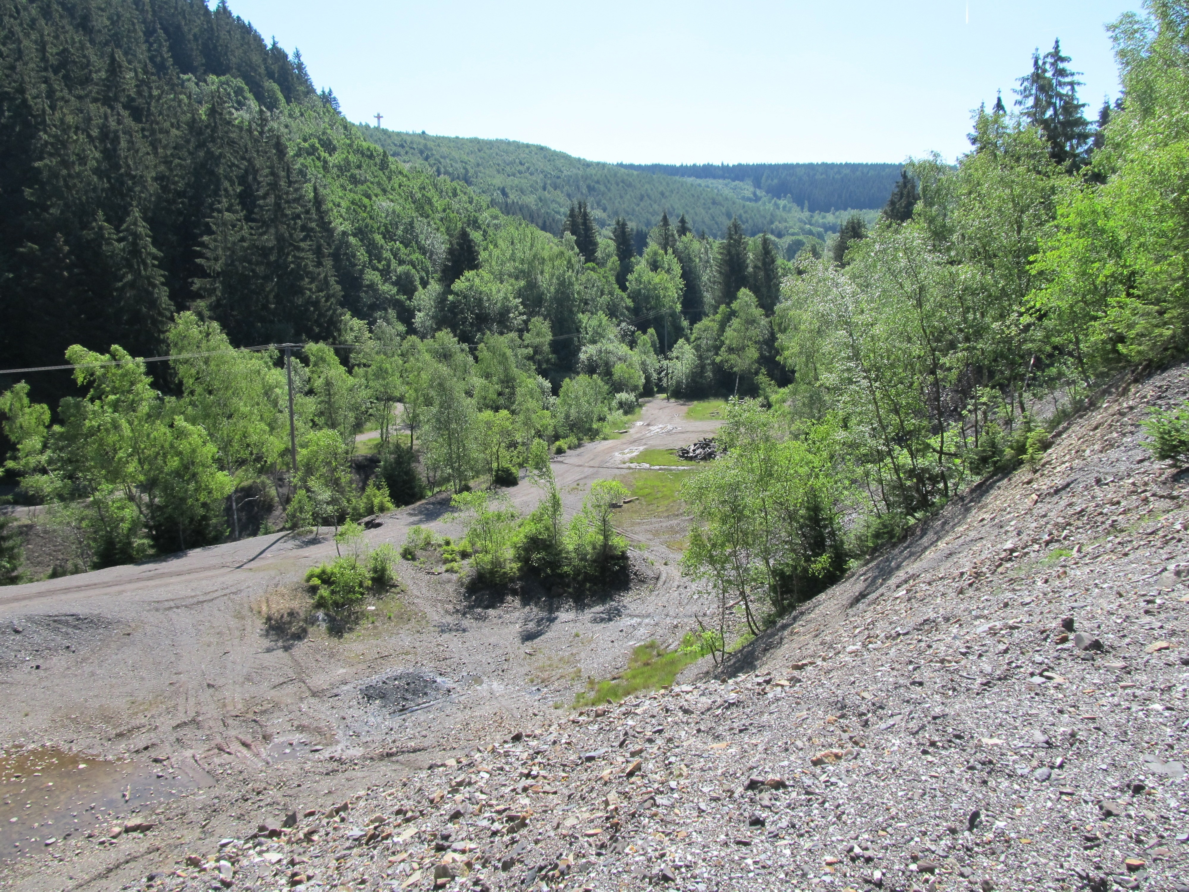 Abraumhalde der Grube Peterszeche im Buchhellertal bei Burbach, Siegerland.